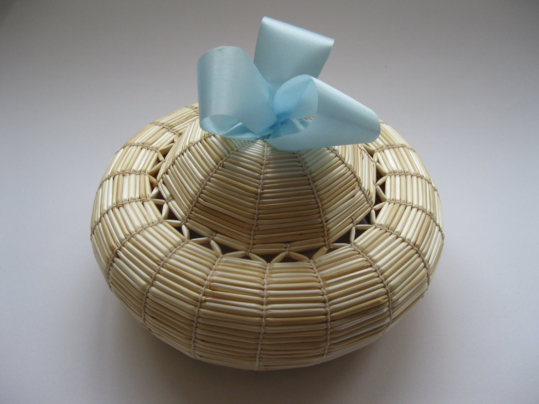 Model de gorra de cop.